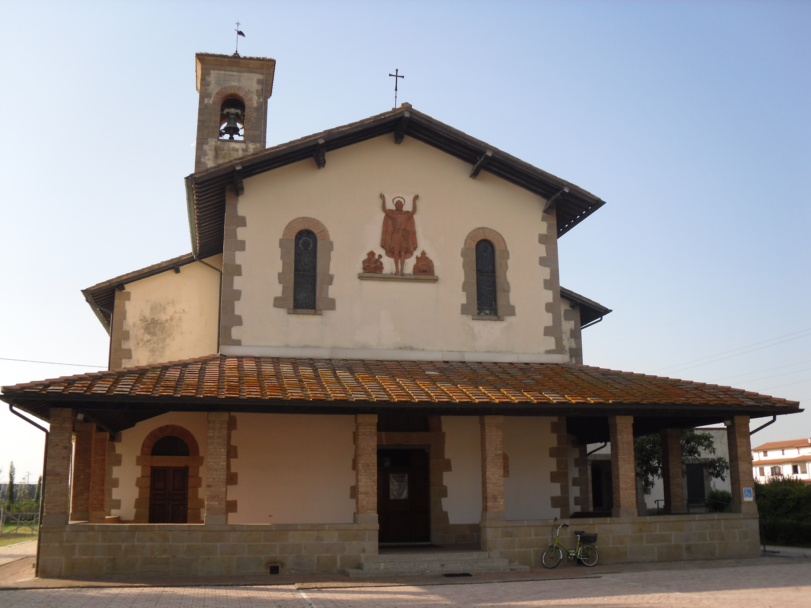 Ernesto Ganelli, chiesa di San Guglielmo di Aquitania, Braccagni (Grosseto)